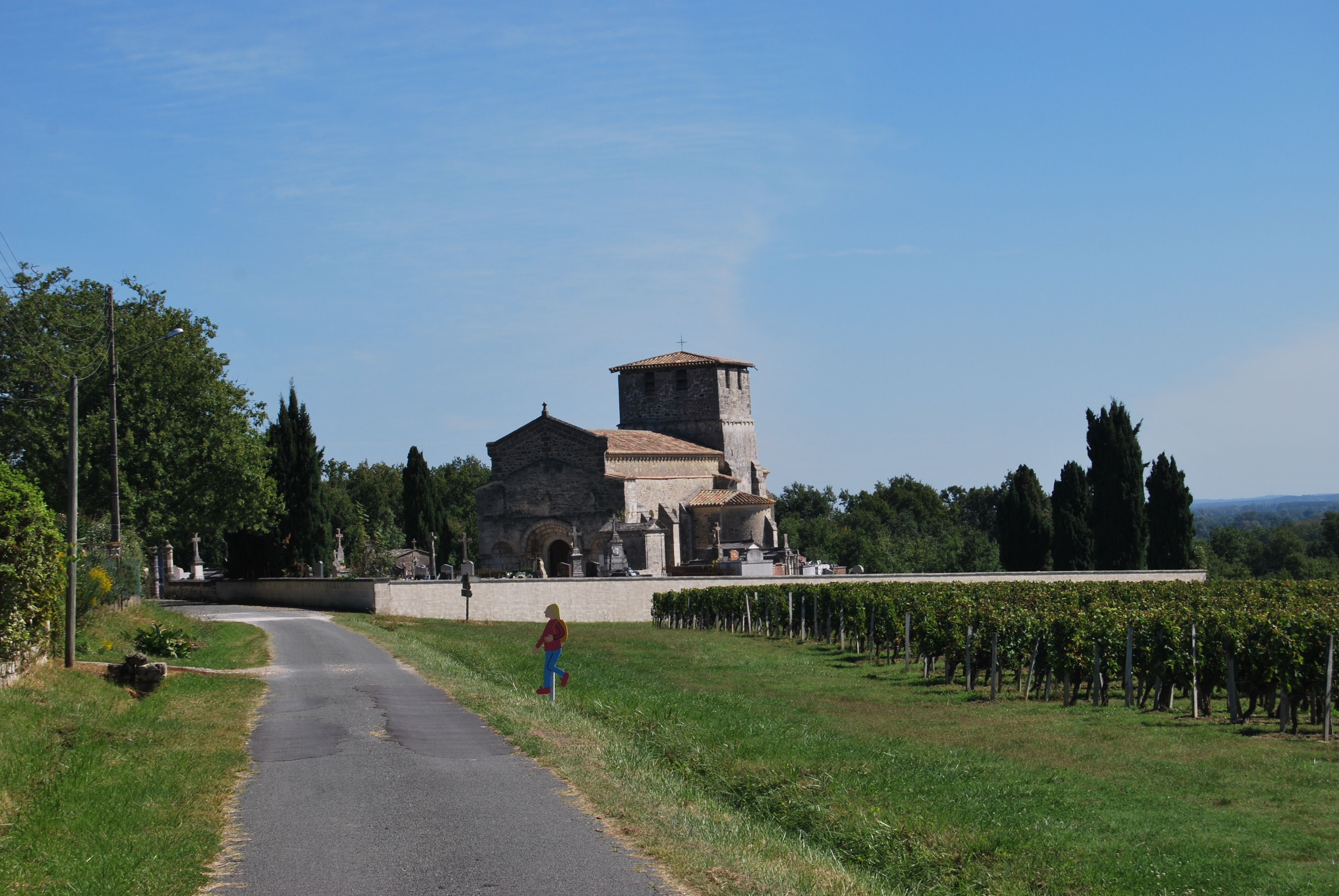 Église de Saint-Martin-de-Laye .